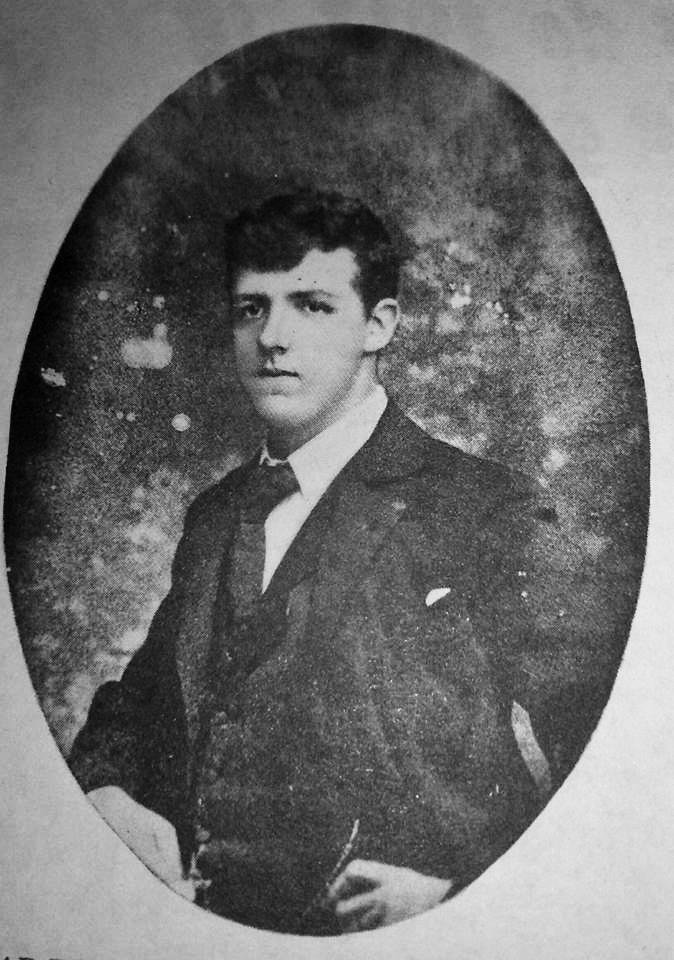 Edgar Zollinger, quien asesinó al general Reina Barrios en 1898.